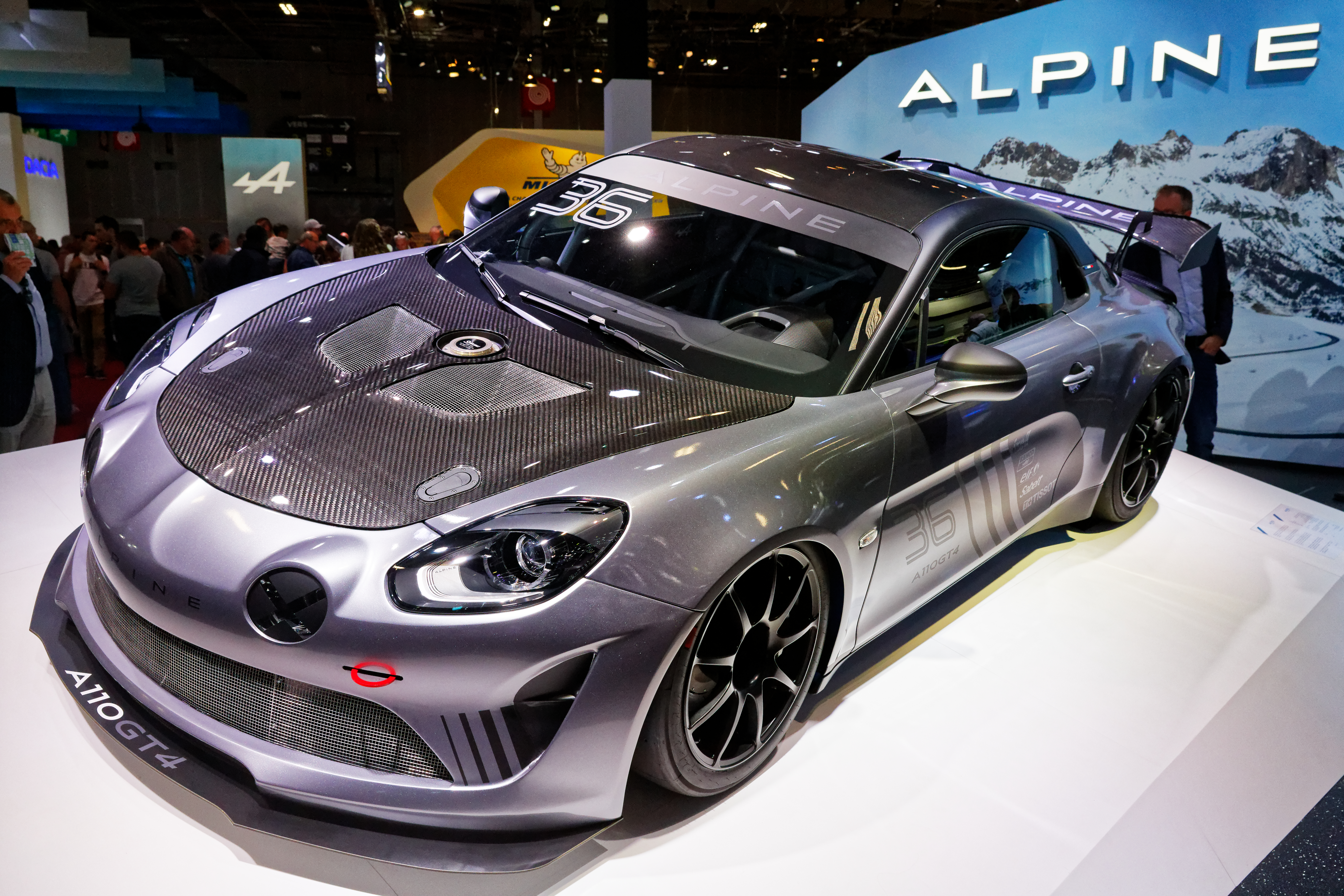 Une Alpine A110 GT4 exposée lors du mondial de l'automobile de Paris 2018.